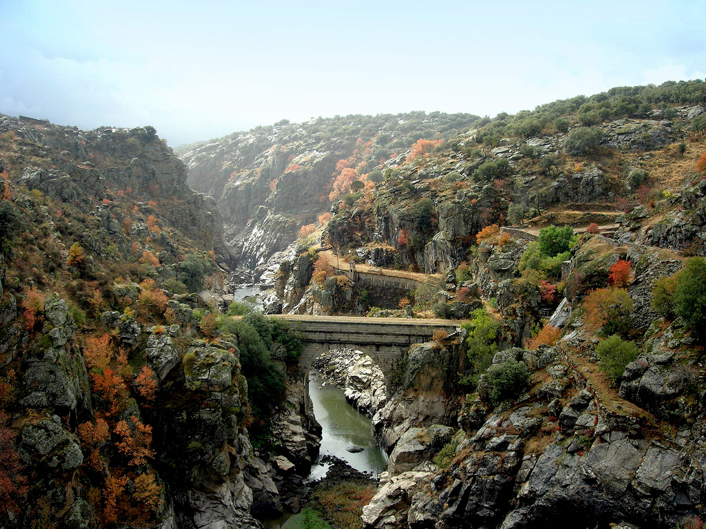 La garganta que forma el río Lozoya en este entorno, destaca como elemento geomorfológico de carácter erosivo, asociado a fenómenos fluviales. Corresponde a formas de incisión lineal, estrechas, cuyo desarrollo vertical (encajamiento) es mayor que su anchura, pudiendo tener condicionantes tectónicos.